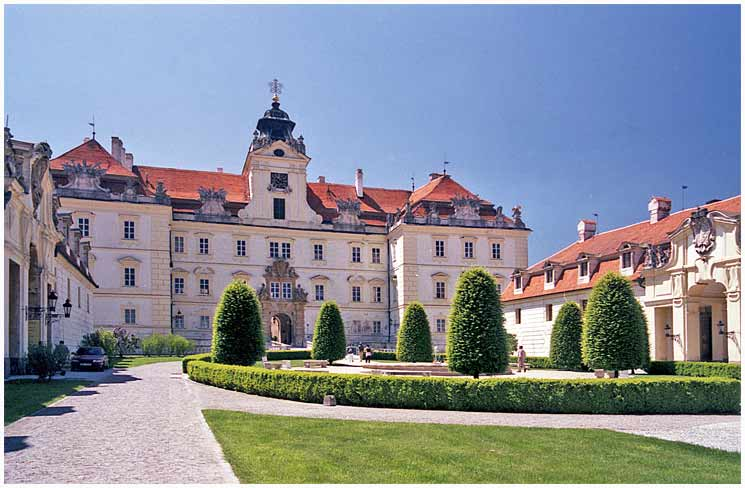 Valtice - zámecké nádvoří.